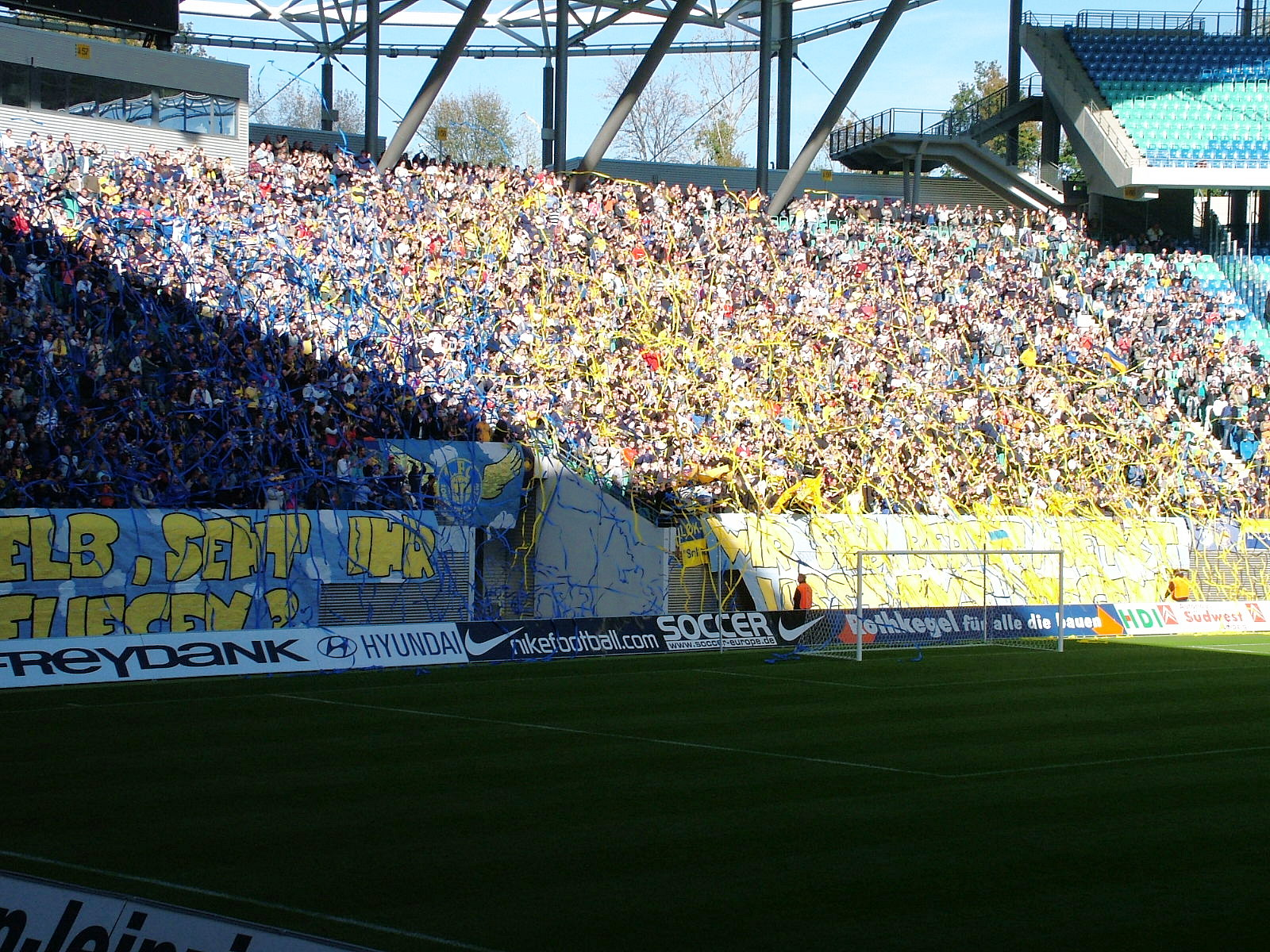 feiernde Lokfans